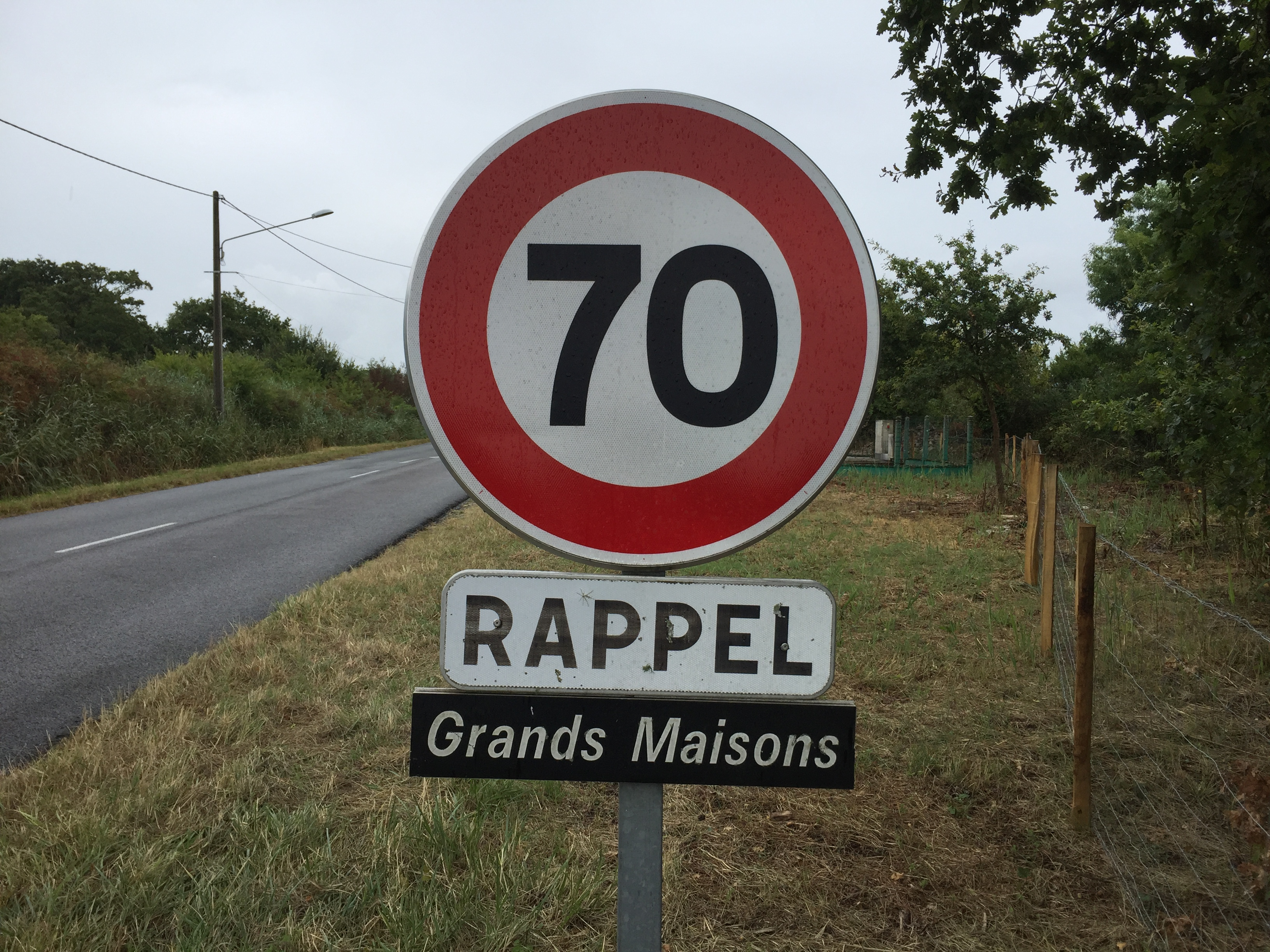 Contrairement à certaines cartes d’aujourd’hui, le hameau s'est toujours appelé Grands Maisons depuis l'abbé Baurein au XVIIIème siècle